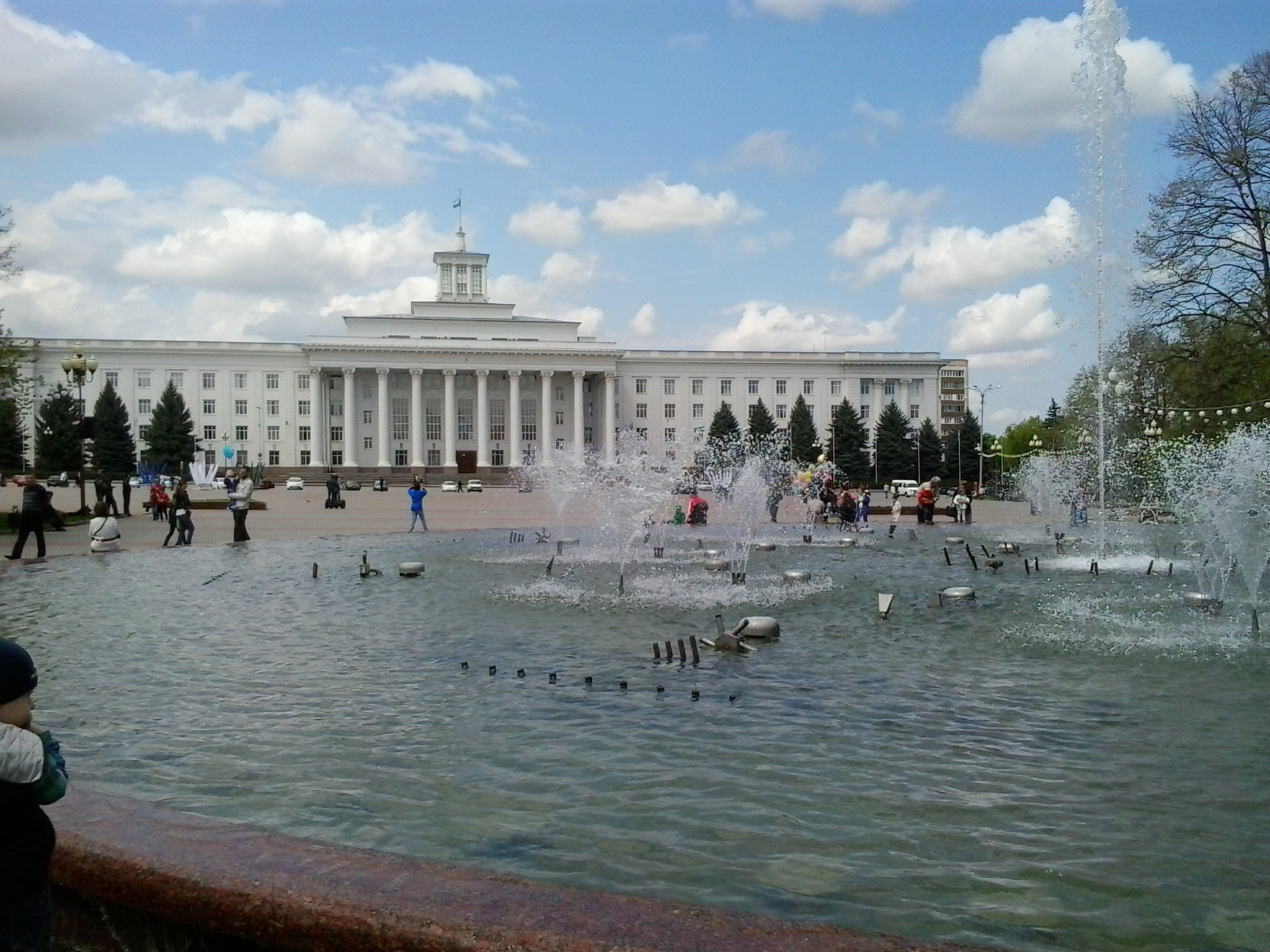 Нальчик, Нальчик This image is related to the protected area of Russia number 0700016